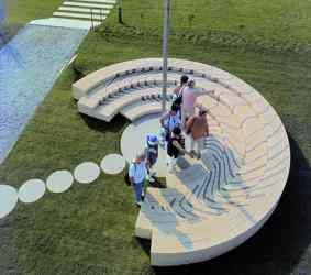 Horizontale Sonnenuhren-Spinne auf vier Ebenen in Plochingen von Yves Opizzo [1]